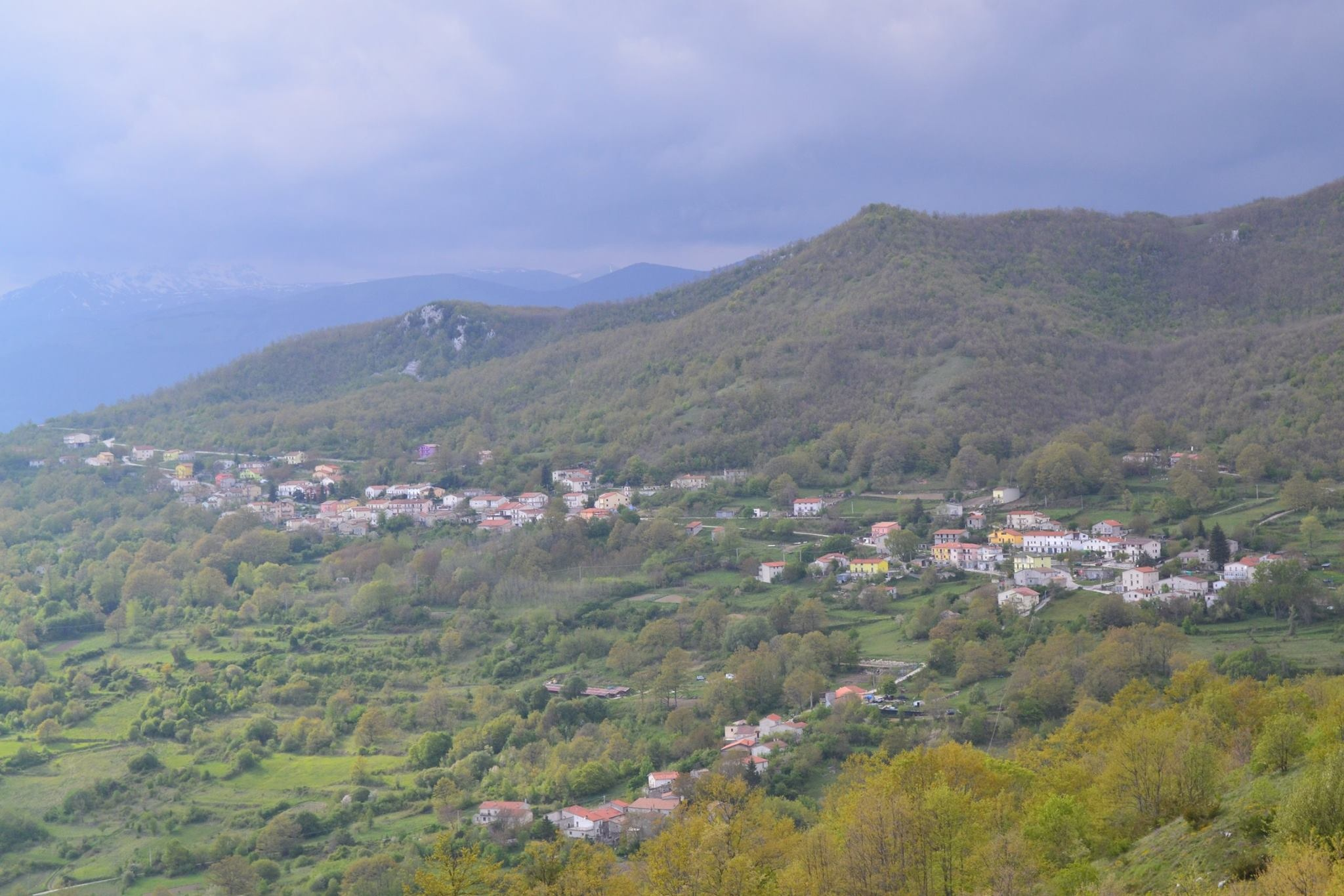 panorama